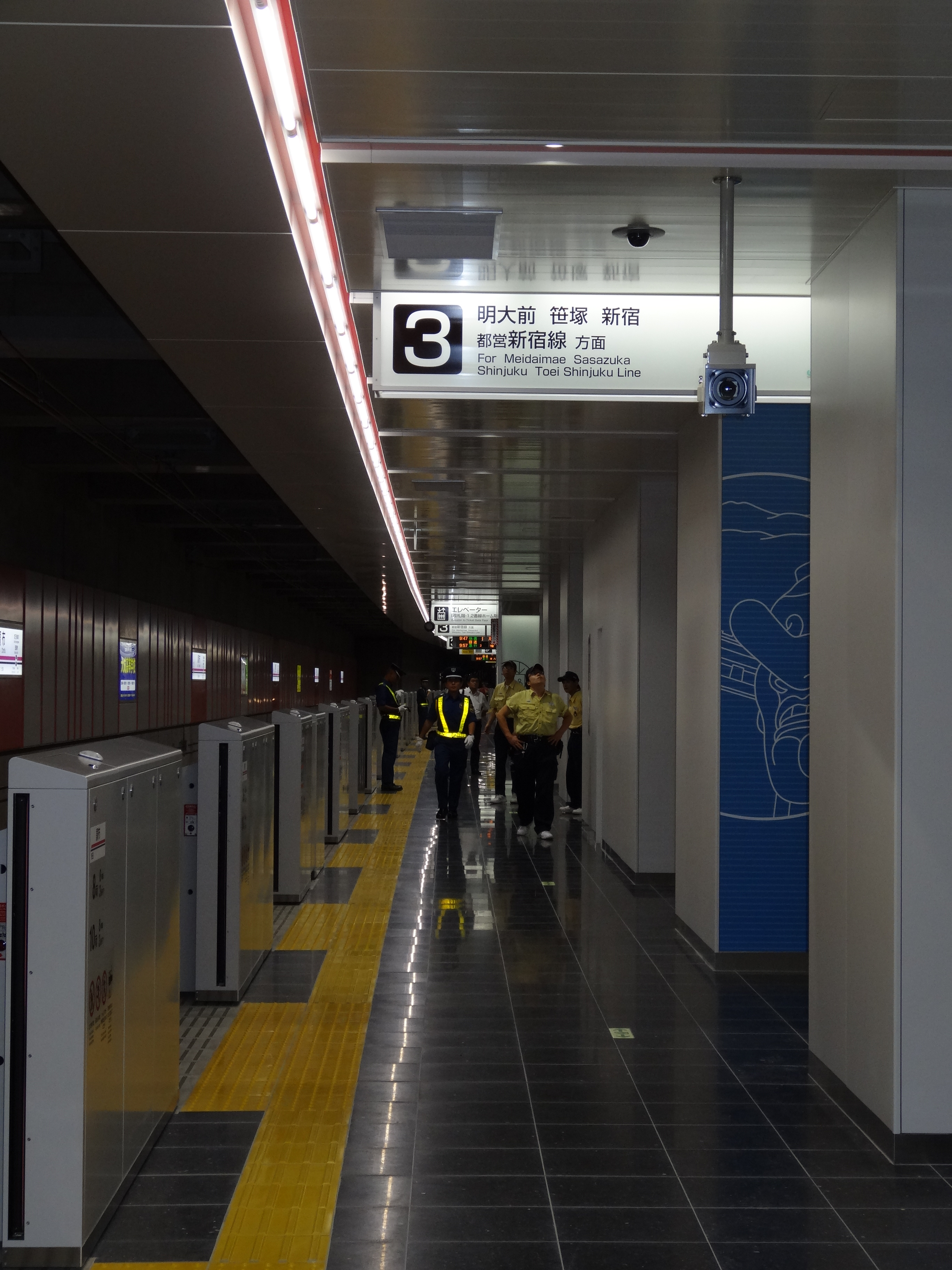 地下化後の調布駅ホーム